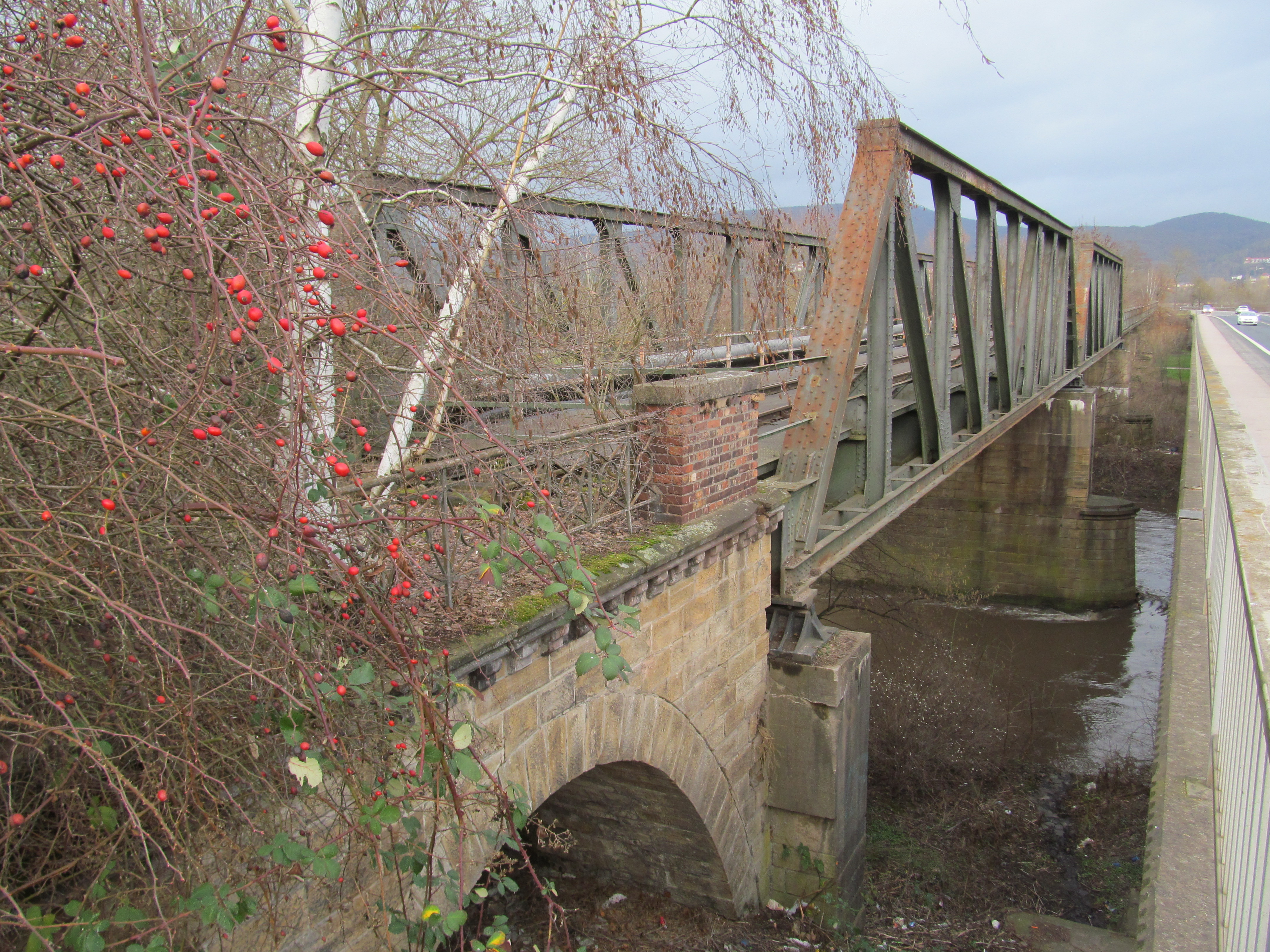 die Eisenbahnbrücke der früheren Kanonenbahn über die Werra bei Eschwege